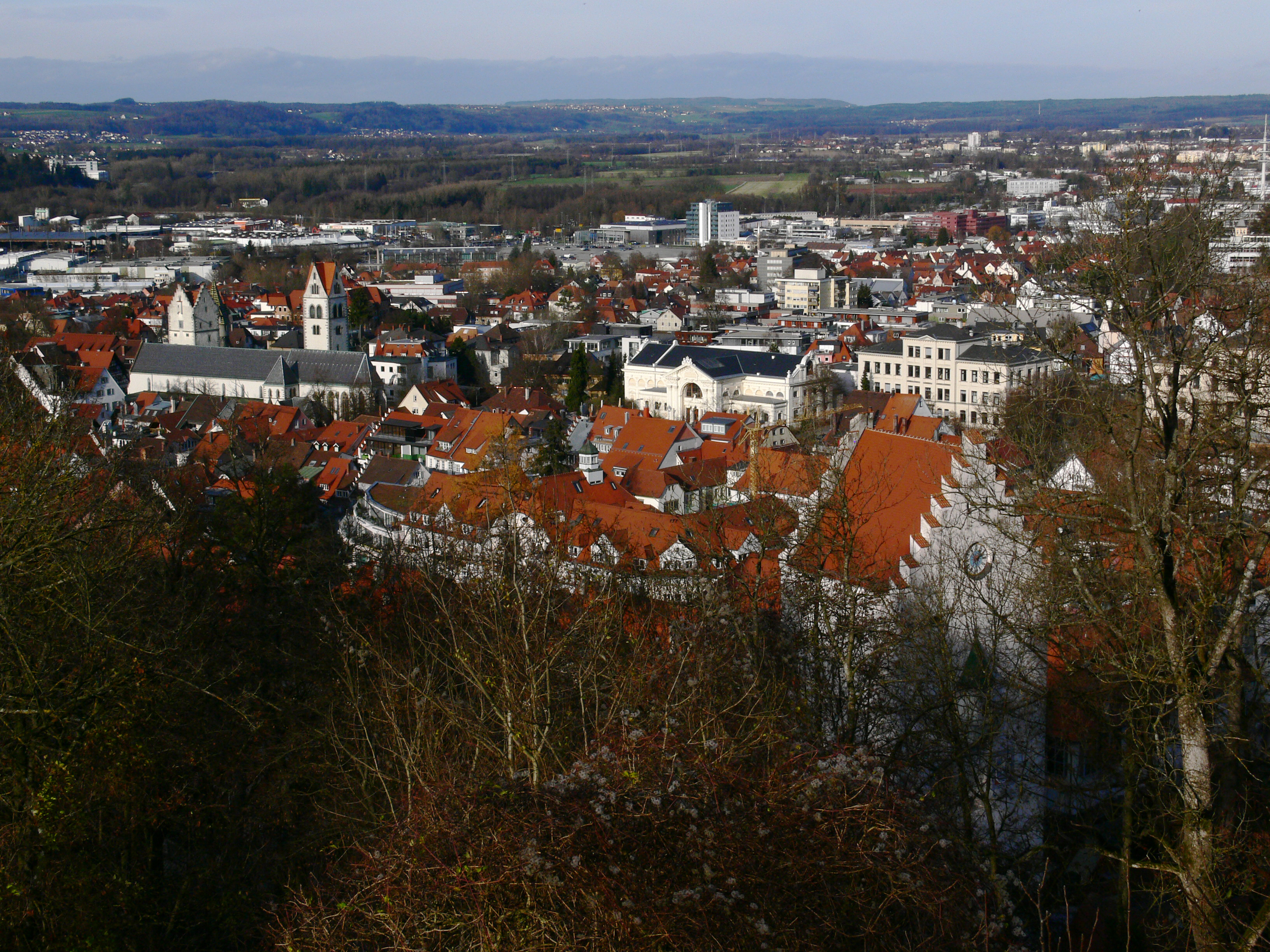 Ravensburg, Blick von der Veitsburg auf Obertor (vorne), Liebfrauenkirche (links), Konzerthaus (Mitte)